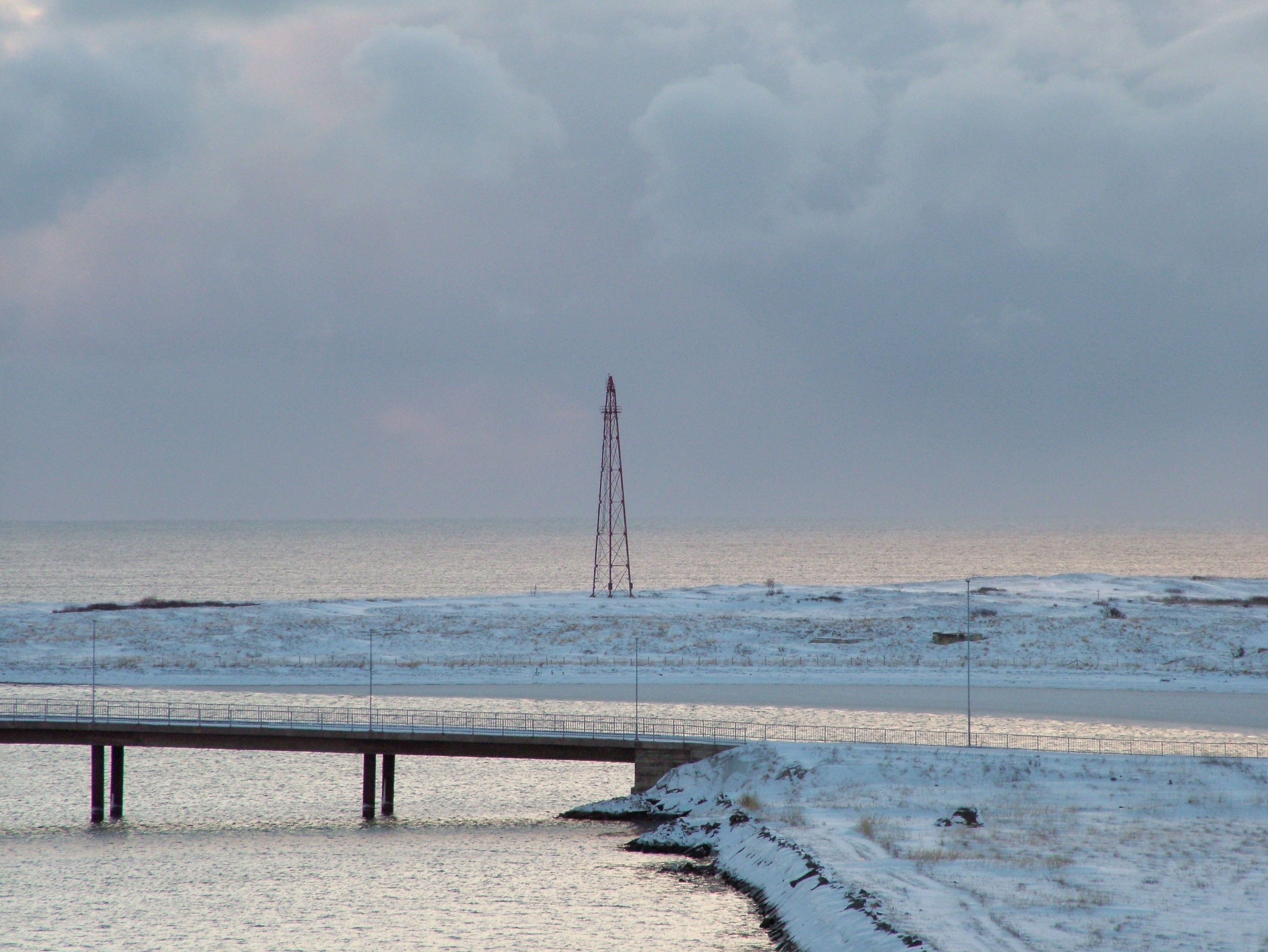 Vadsø mit dem Ankermast des Luftschiffs Norge von Umberto Nobile, Nord-Norwegen.